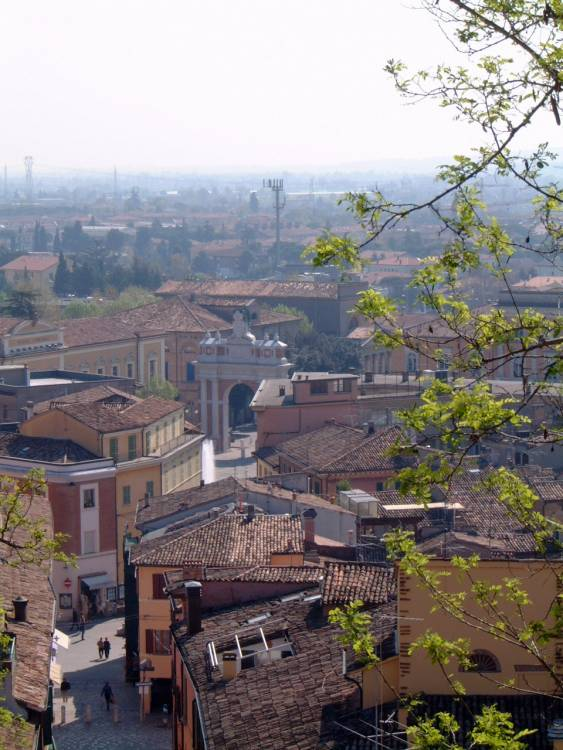 Je suis l'auteur de cette photo prise en avril 2007 depuis la "Rocca" de Santarcangelo.